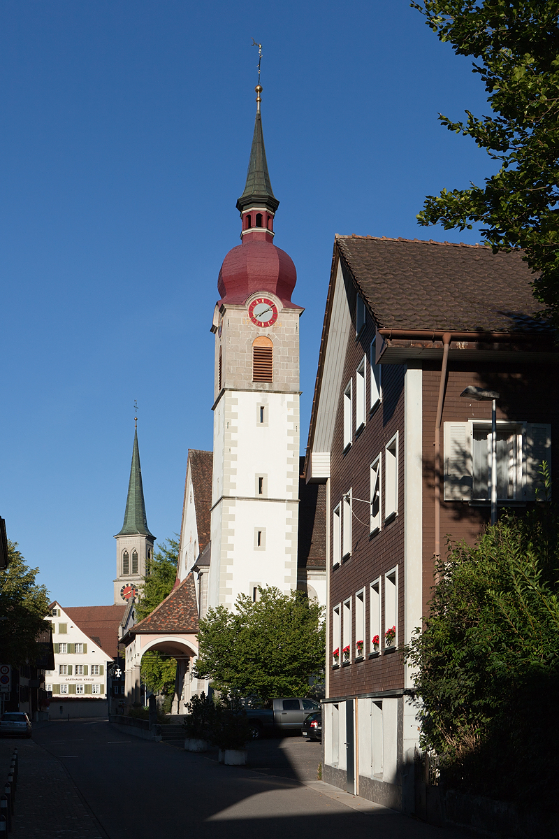 Marienkirche und in der Ferne die Pfarrkirche von Unterägeri